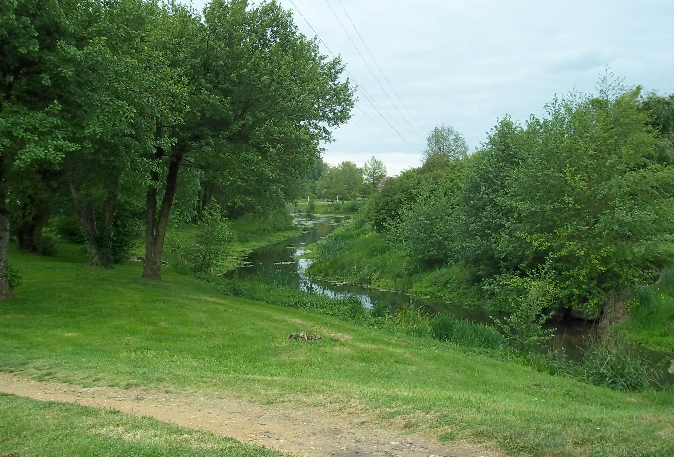 le ruisseau de l'Auneau traversant le centre du bourg